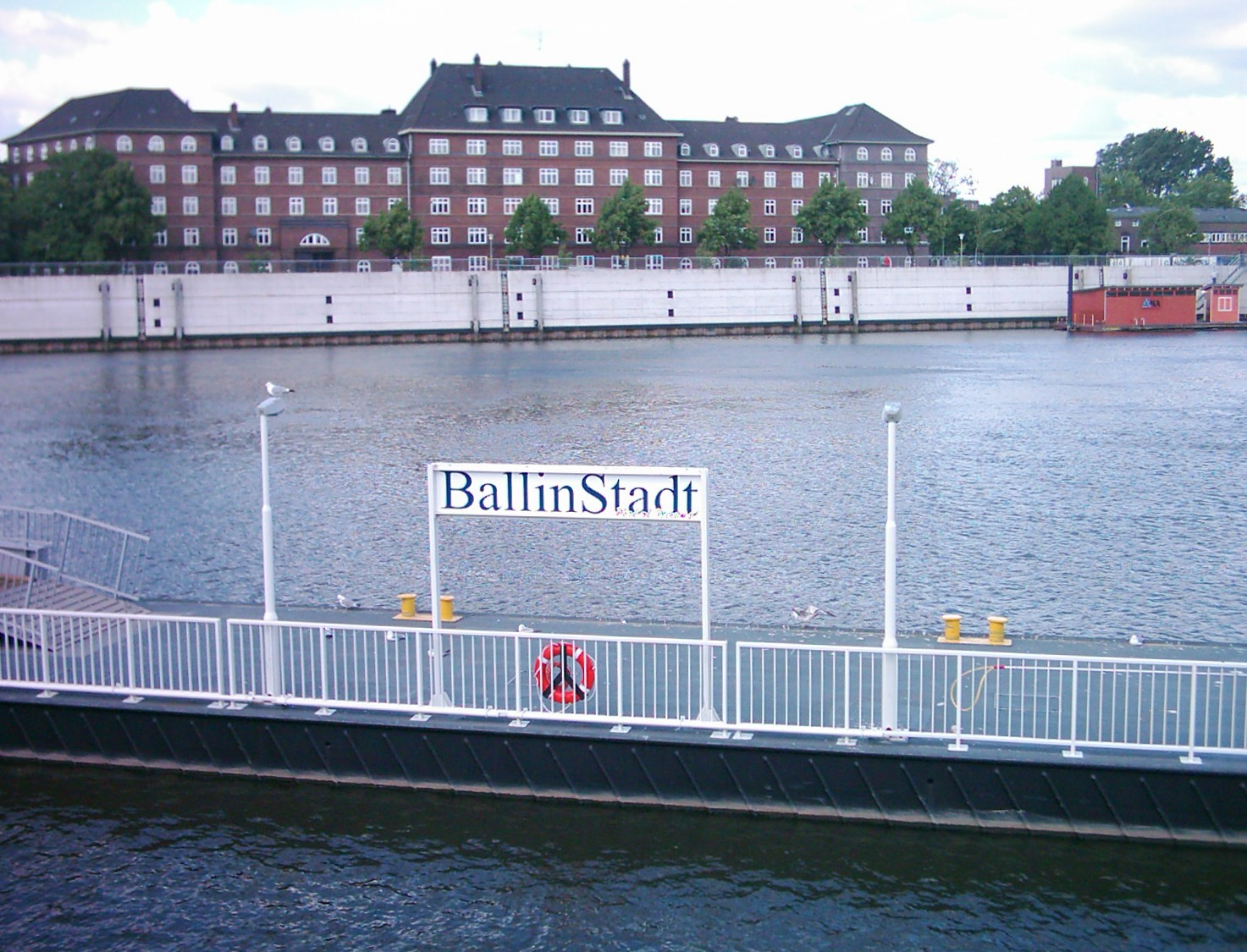 Schiffsanleger der BallinStadt (Auswandererhallen) am Müggenburger Zollhafen in Hamburg-Veddel.